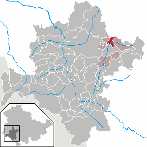 Unterschönau in Thuringia - District Schmalkalden-Meiningen